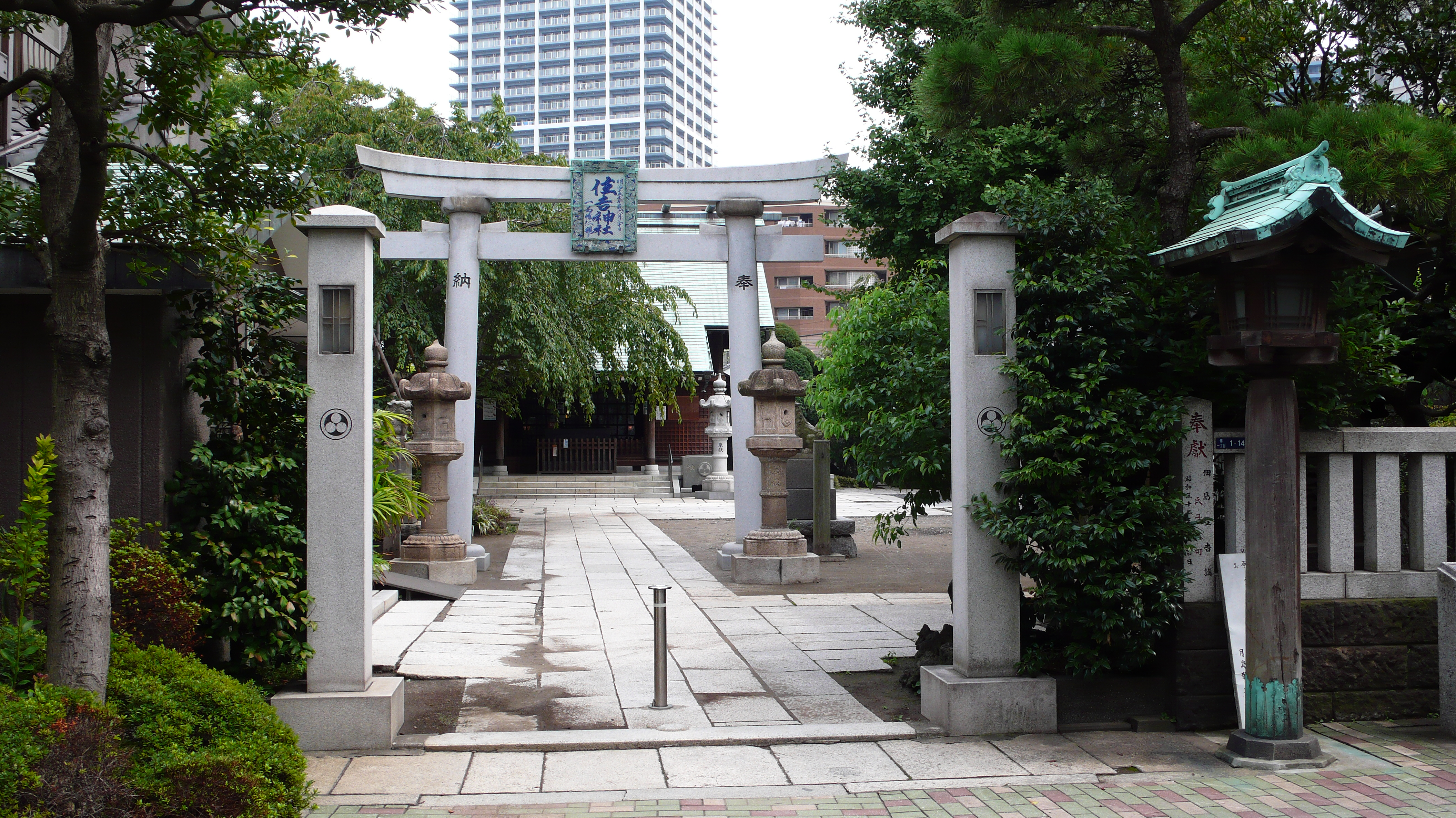 Sanctuaire Sumiyoshi - Chuo-ku, Tokyo - Japon